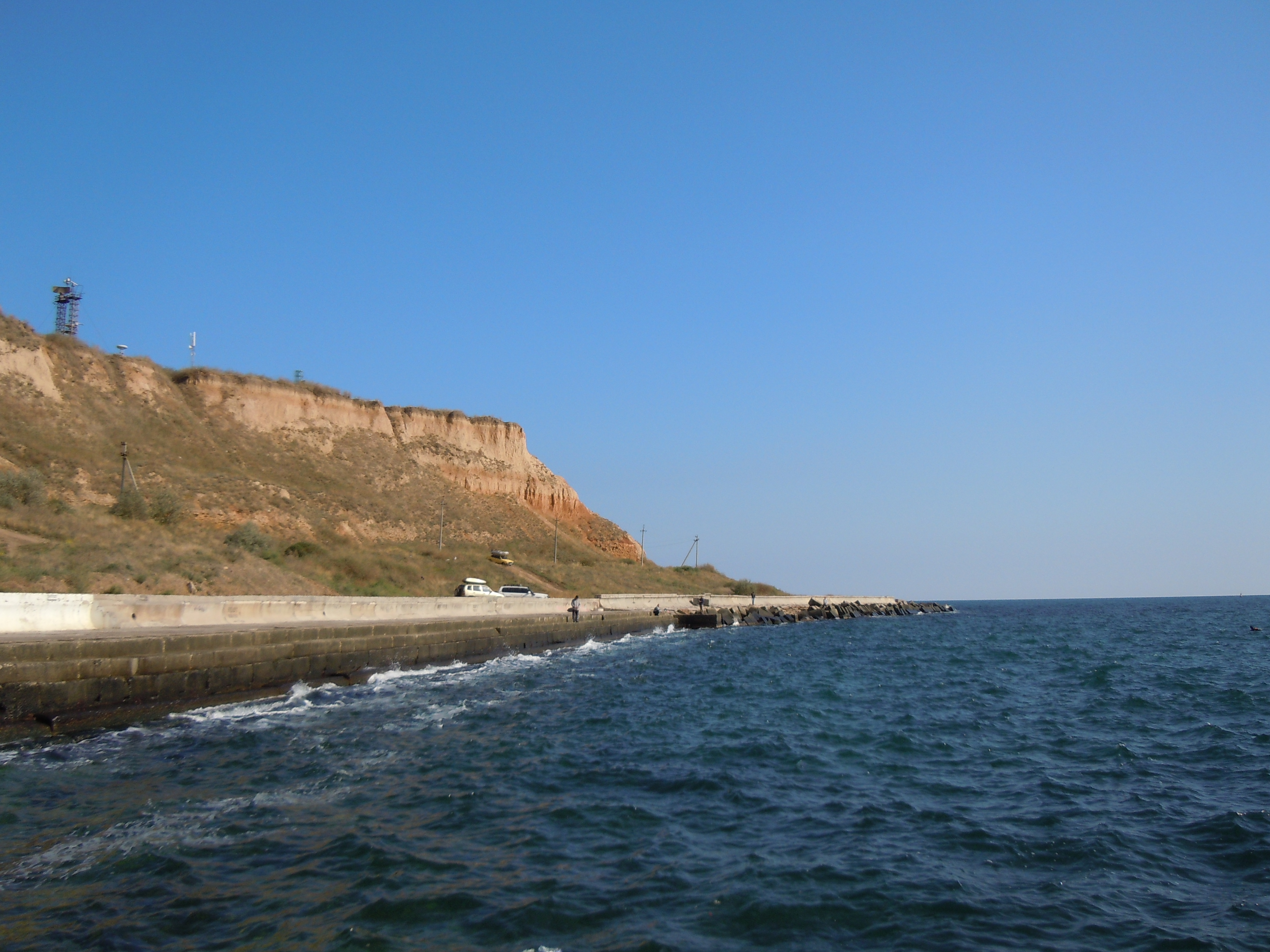 Вид на мис Великий Фонтан з півдня